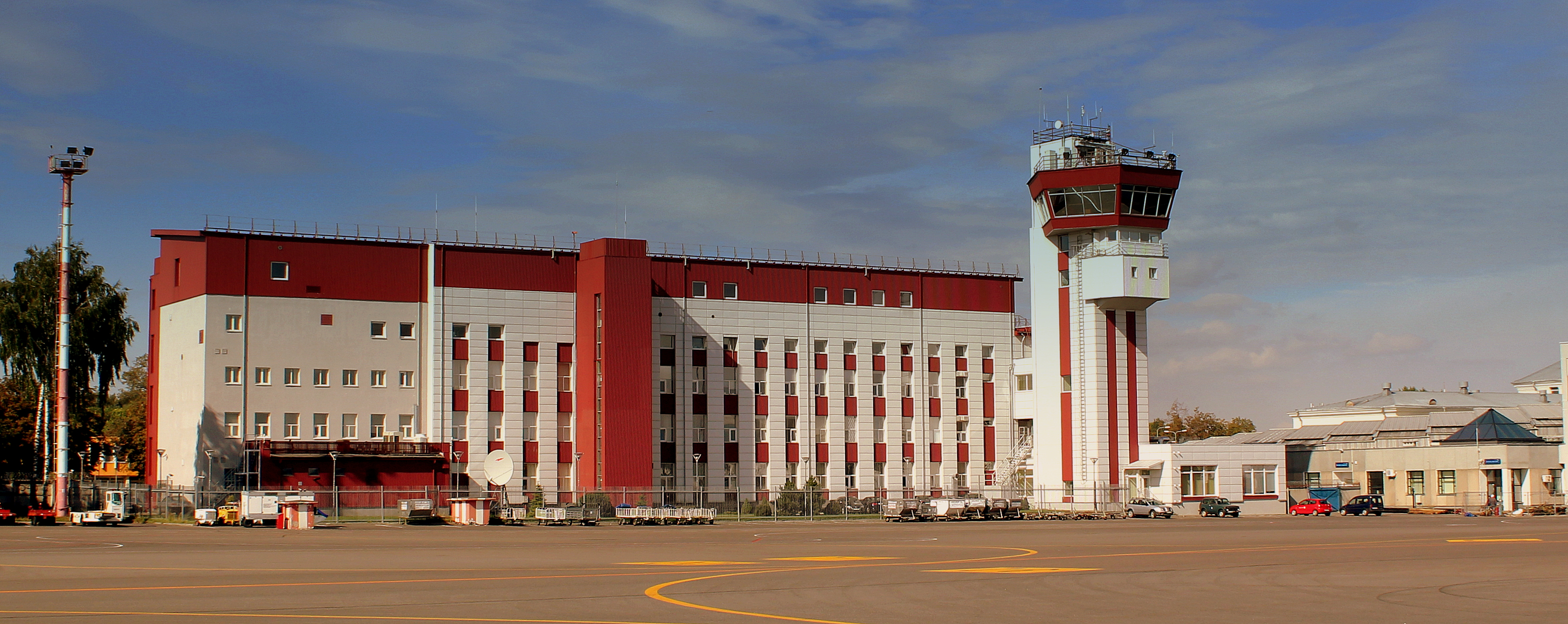 VILLINUS ORO UOSTAS AIRPORT LITHUANIA SEP 2013